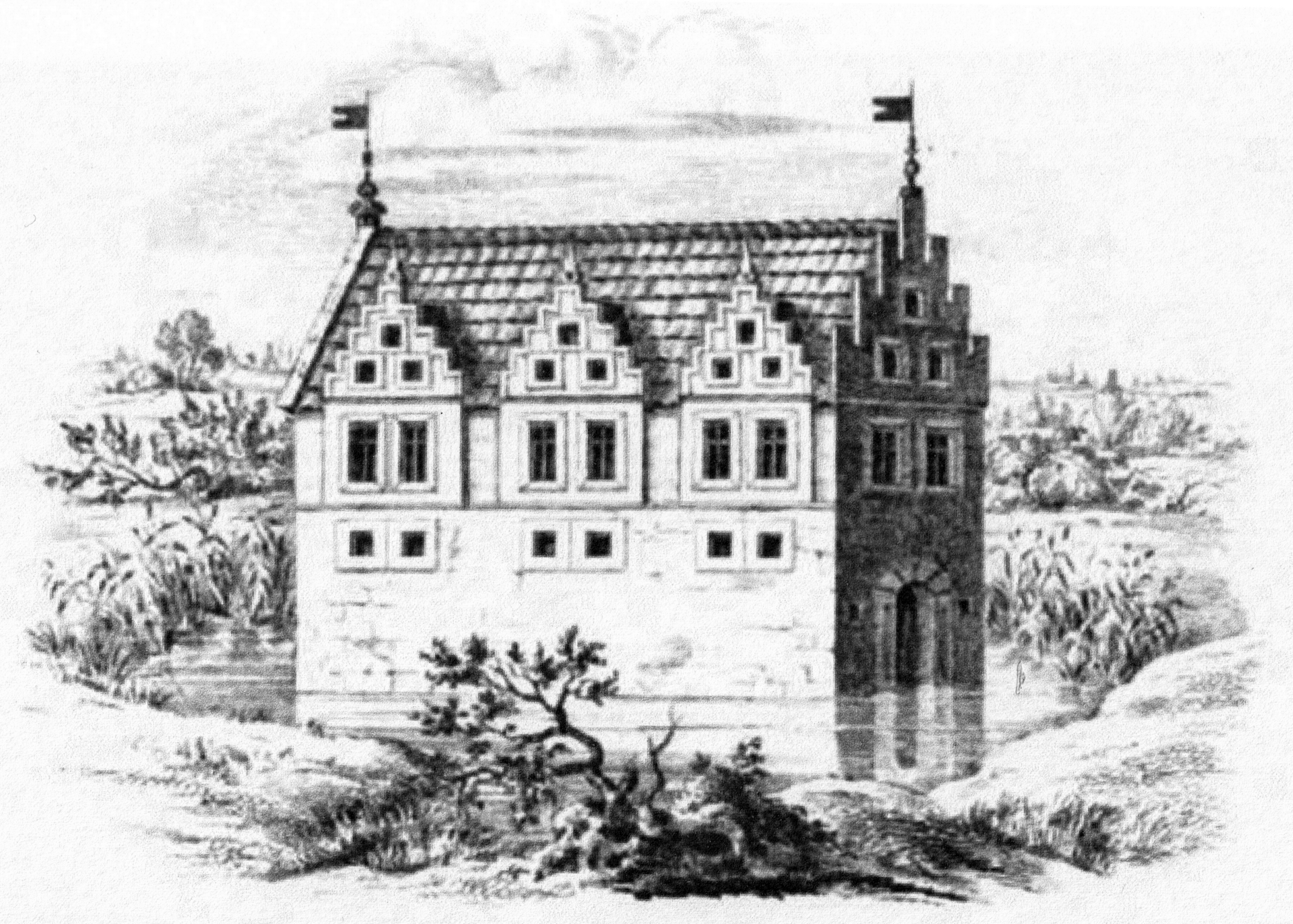 Das alteWasserburg Kohövede, Zeichnung von Köhler und Roisternitz 1862